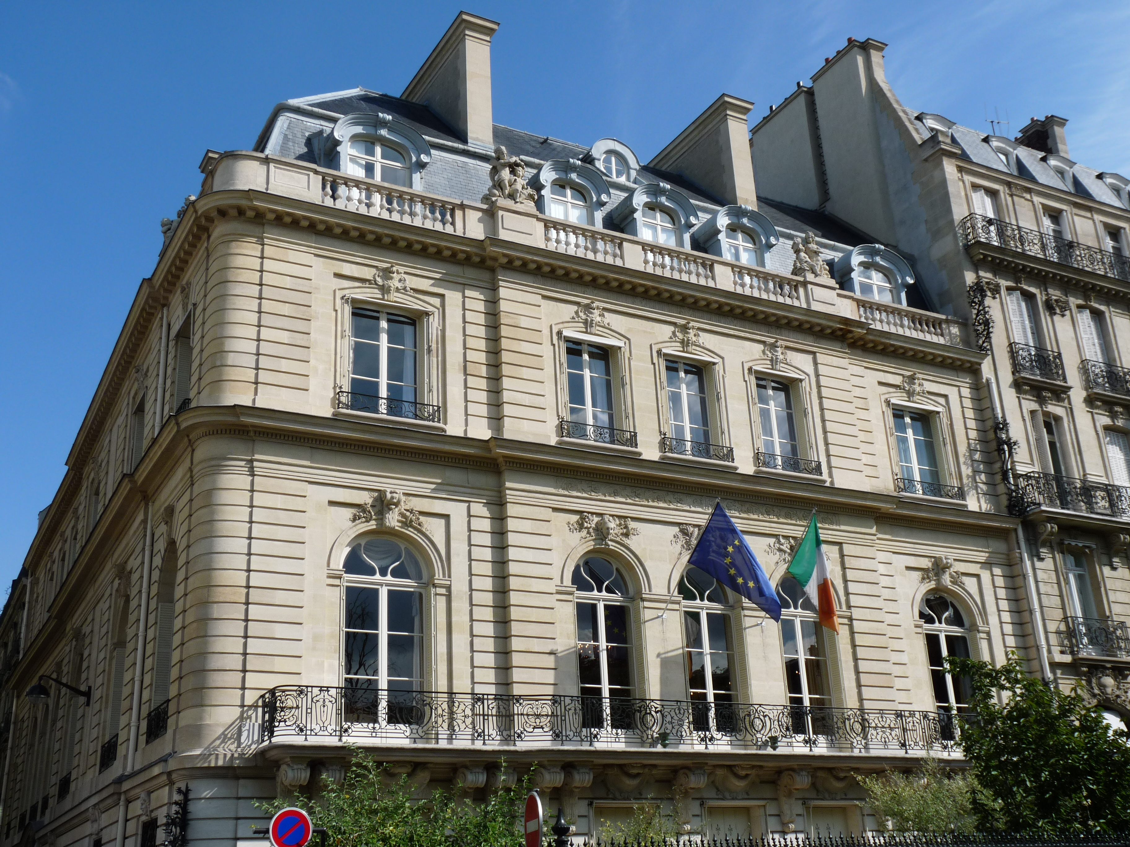 L'hôtel Breteuil à Paris, vu de l'avenue Foch